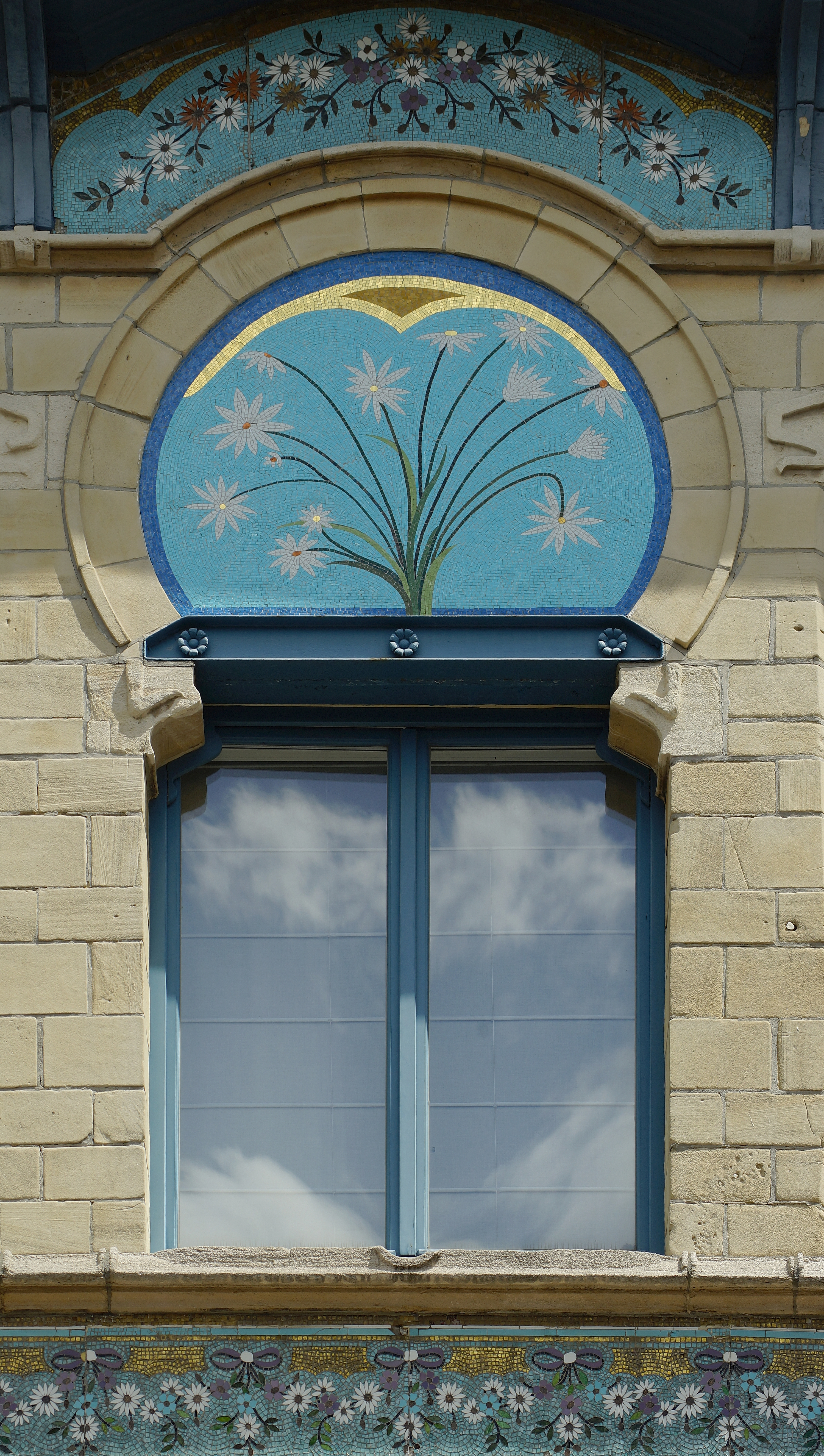 Oeuvre van architect Jozef Baeckelmans